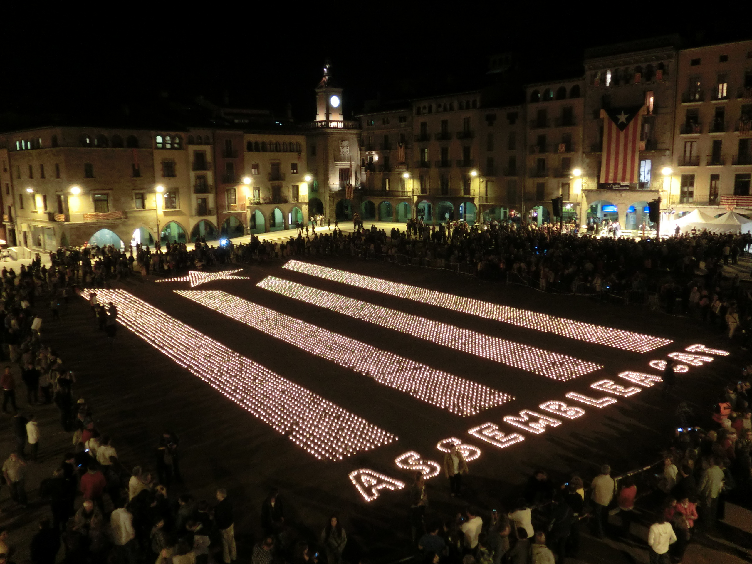 Gran estelada formada per gairebé 8.000 espelmes a la plaça Major de Vic (Osona), organitzada per l'Assemblea Nacional Catalana el dia 11 d'octubre de 2012, un mes després de la manifestació independentista a Barcelona de l'11 de setembre.